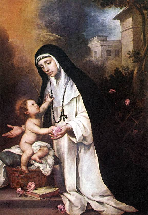 El lienzo representa a Santa Rosa de Lima, que viste el hábito de las dominicas y aparece arrodillada y observando profundamente emocionada al Niño Jesús, que descansa sobre una almohada colocada sobre un cesto de costura.